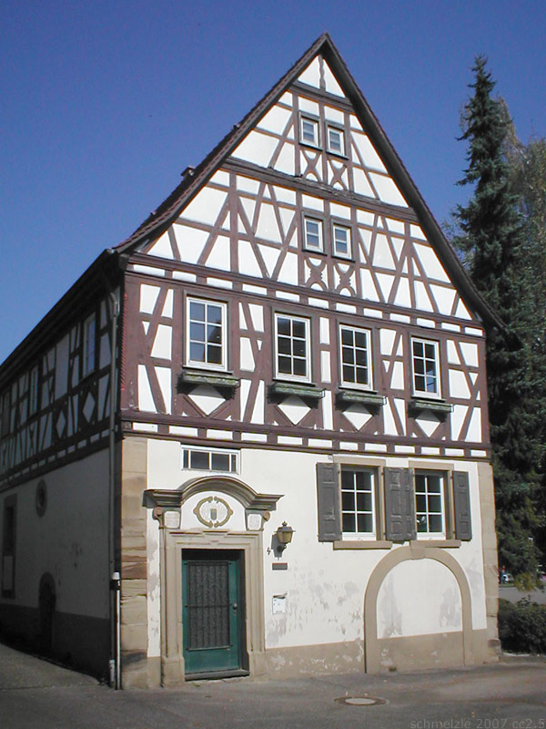 Rathaus in Gemmingen-Stebbach, erbaut unter Schultheiß Johann Jakob Lörz durch Baumeister Johann Christoph Feihl aus Stetten (Heuchelberg) 1755.